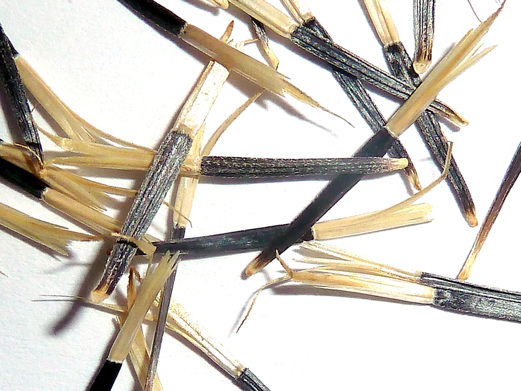 Tagetes erecta (Clavelón de la India, cempasúchil, ...): Cipselas sueltas, finamente estriadas longitudinalmente y con el vilano de 2 tipos de escamas: 1-2 escabridas y largas y otras 2-4 más cortas parcialmente soldadas entre sí y solo dentadas apicalmente. - Ornamental, Calle Goya, Madrid (España).